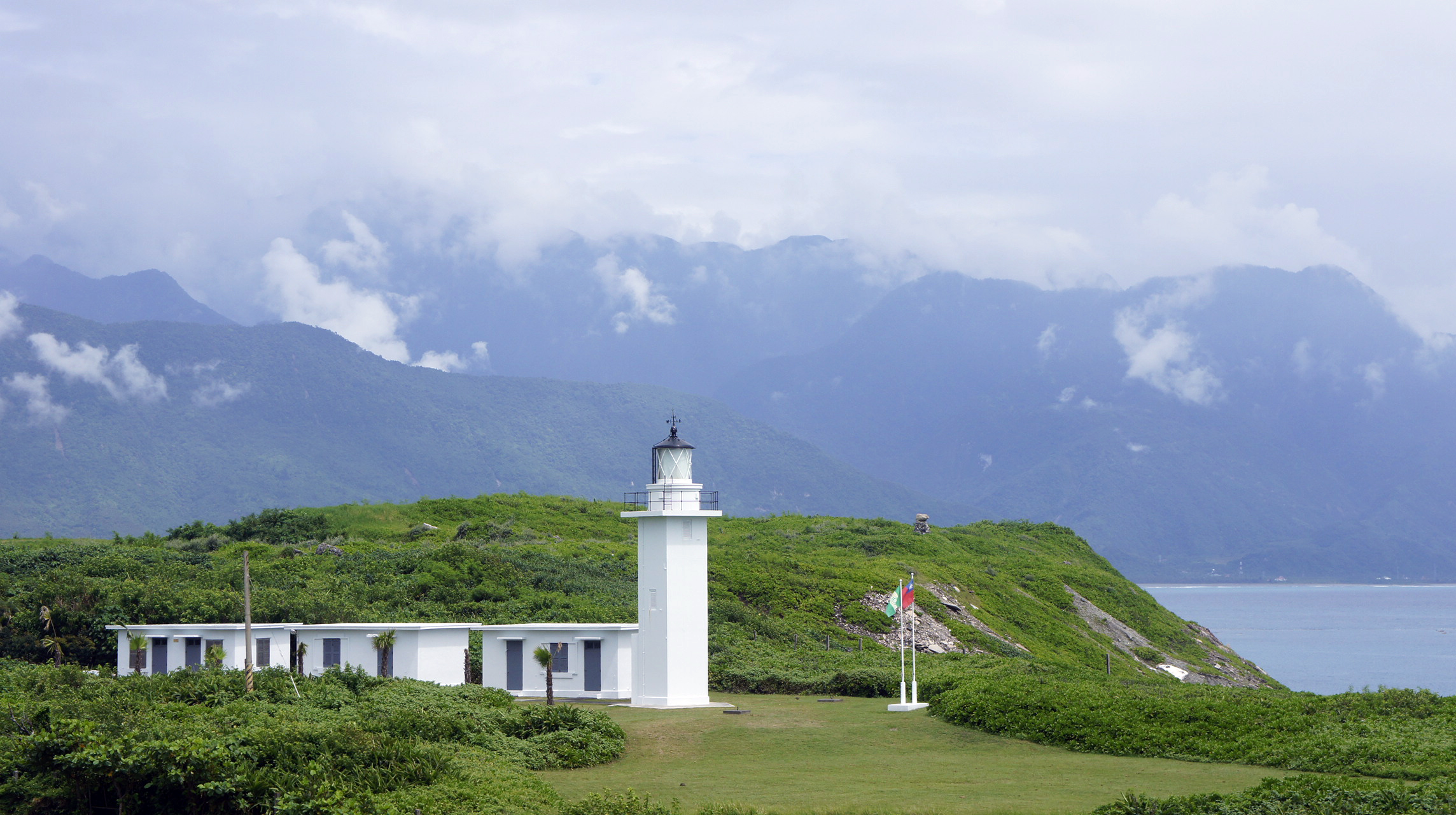 中文（台灣）: 奇萊鼻燈塔